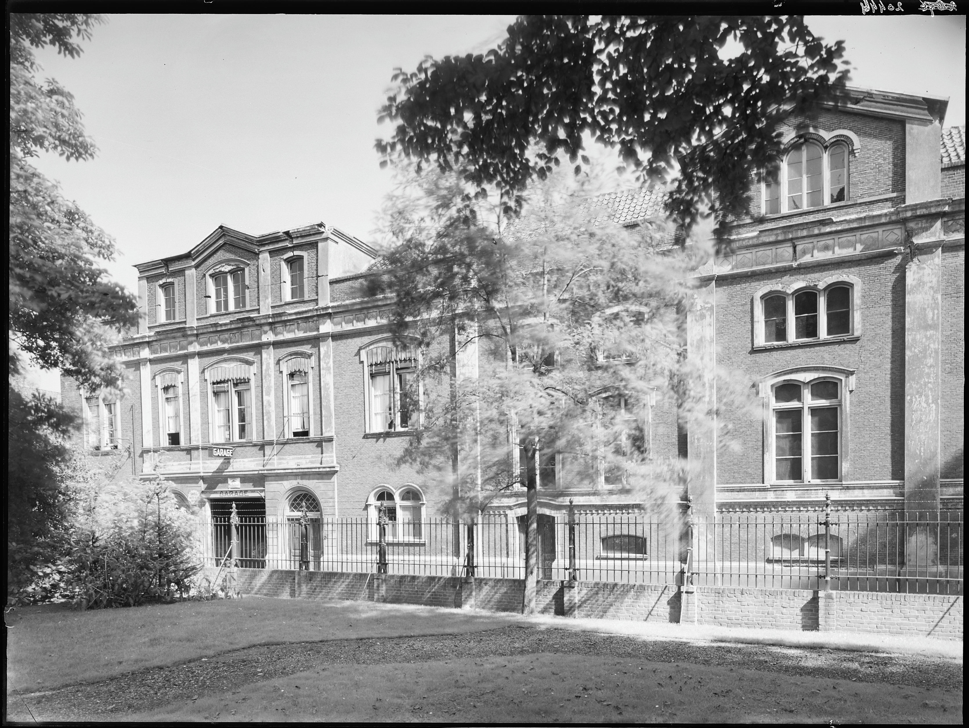 Looihallen: Jeruzalemstr. 7